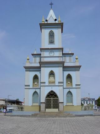 Igreja Matriz do Municipio de São Tiago - MG - Brasil